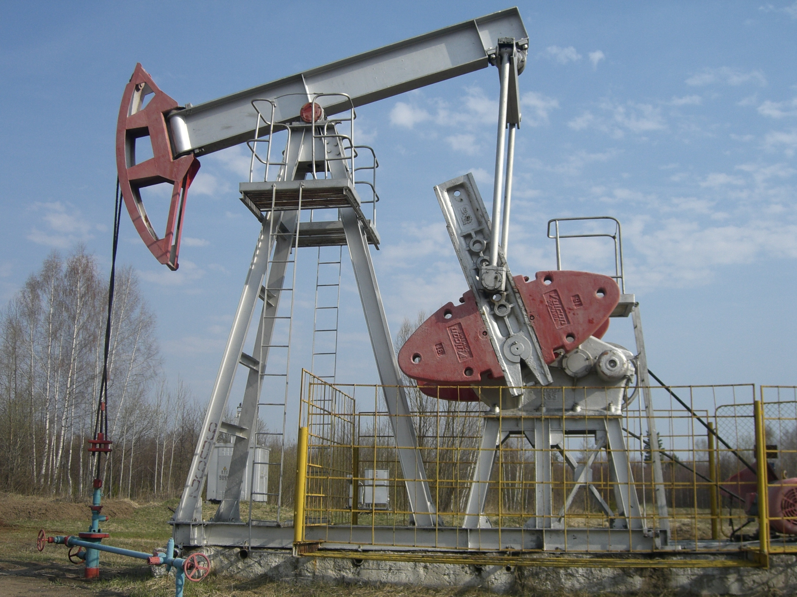 Станок-качалка "Вулкан" производства г. Бухарест Румыния